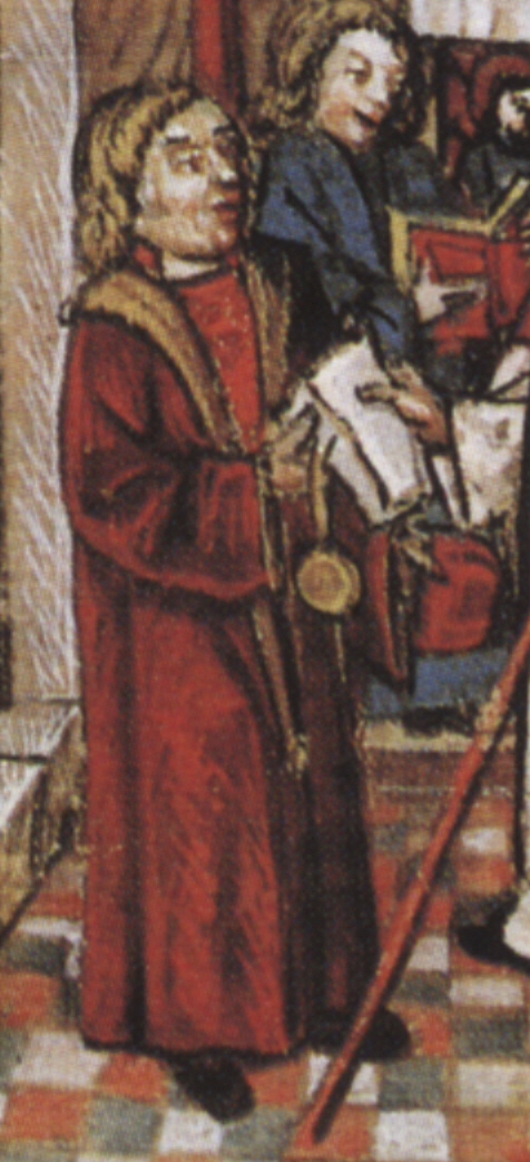 Konstanzer Bistumsstreit von 1474, abgebildet in Diebold Schillings Schweizer Bilderchronik, 1513. Zentralbibliothek Luzern. Ludwig von Freyberg